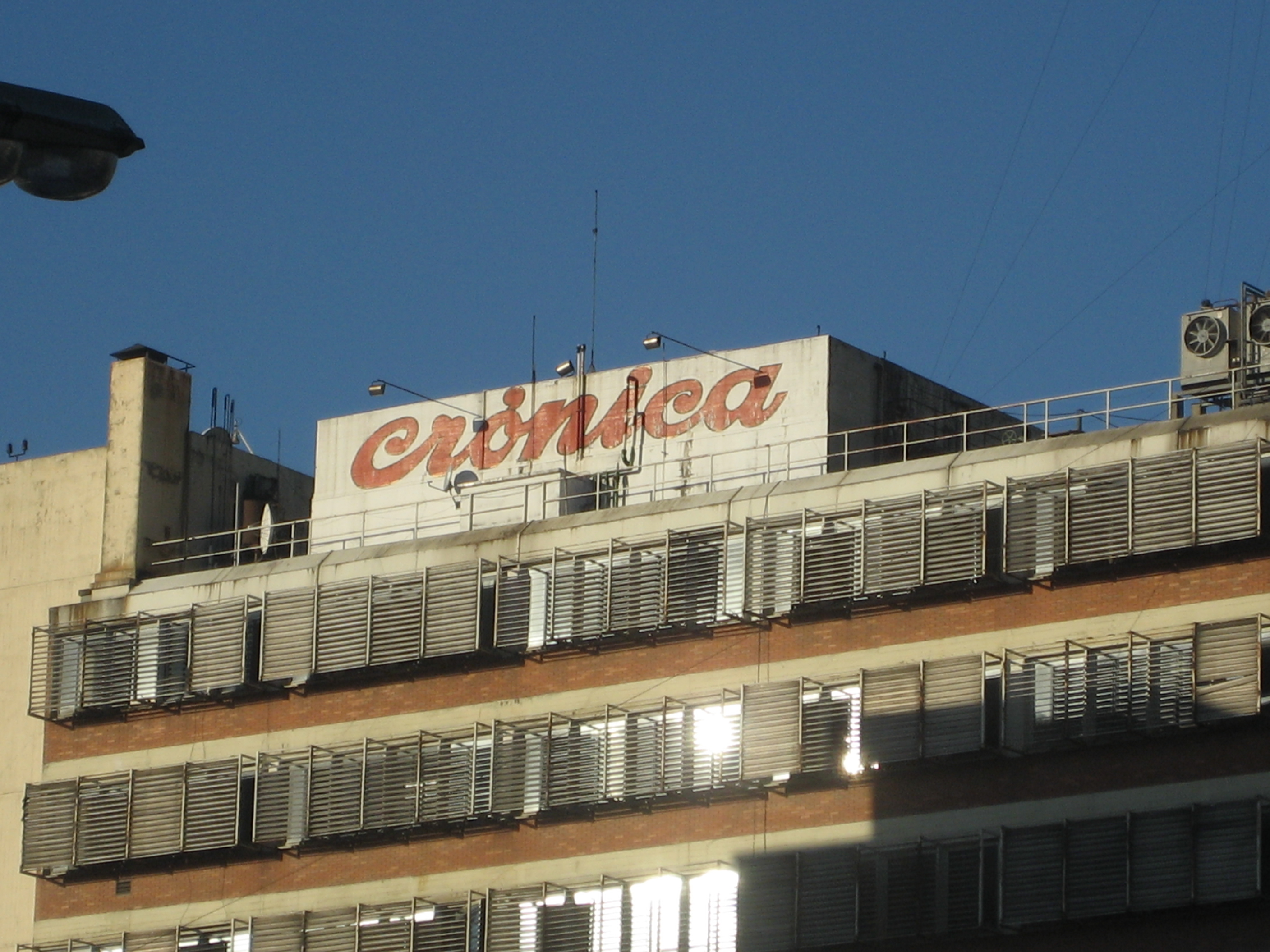 edificio del canal de TV, Crónica TV; cerca de Parque Lezama